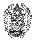 Рёо - маска бугаку